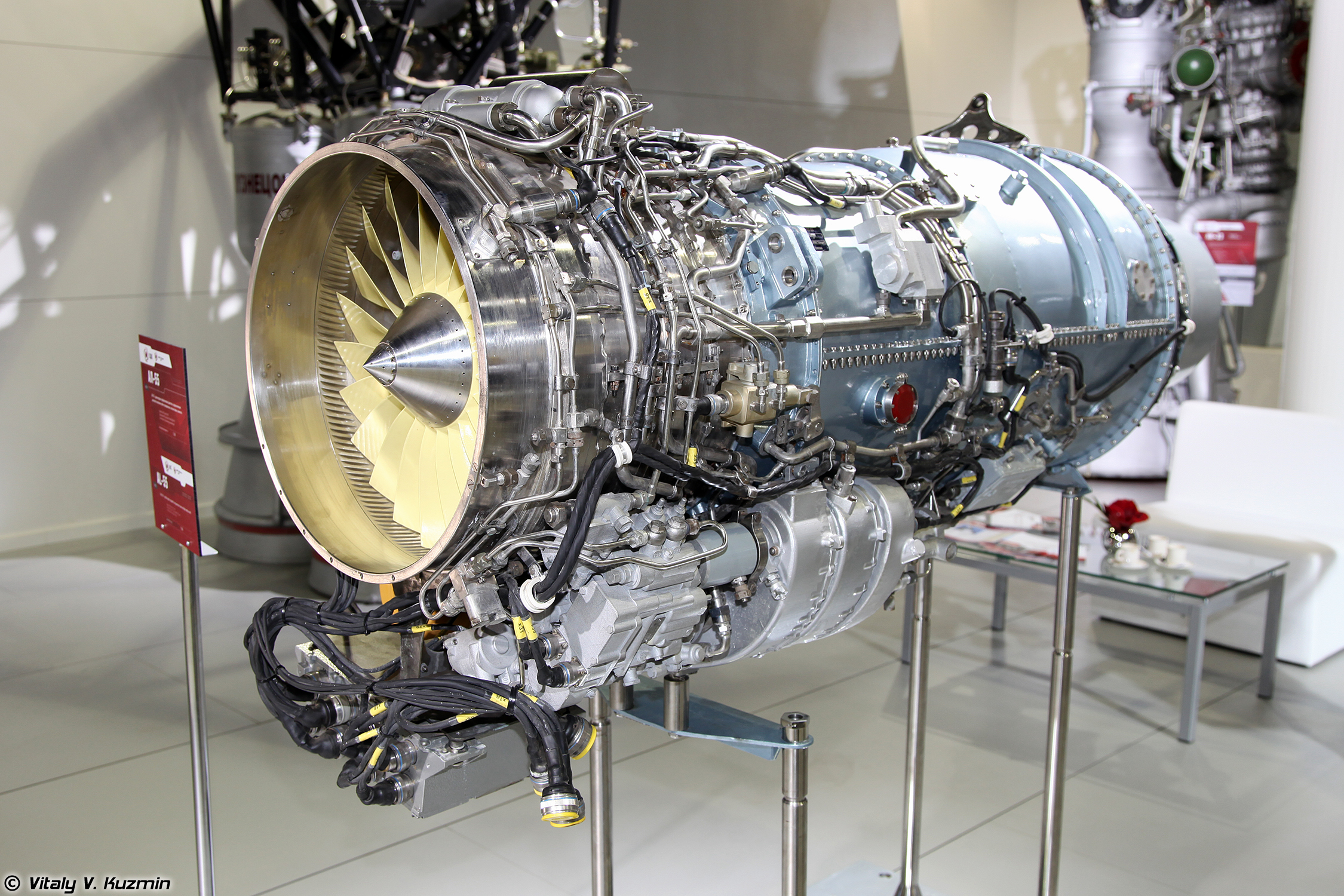 Турбореактивный двигатель АЛ-55 (AL-55 engine)